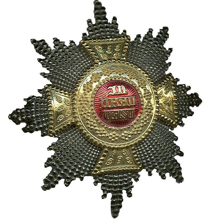 eigen scan van een ster in mijn verzameling